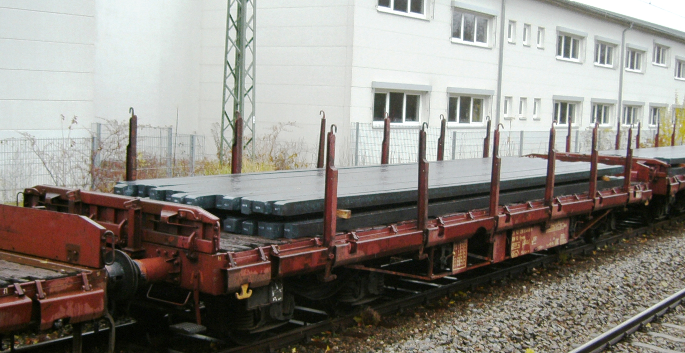 Vierachsiger Flachwagen der Regelbauart, Gattung Rgmms, Eigentümer: Trenitalia. Aufgenommen im Bahnhof Fürstenfeldbruck.